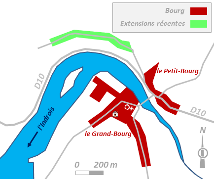 configuration du chef-lieu communal de Chemillé-sur-Indrois